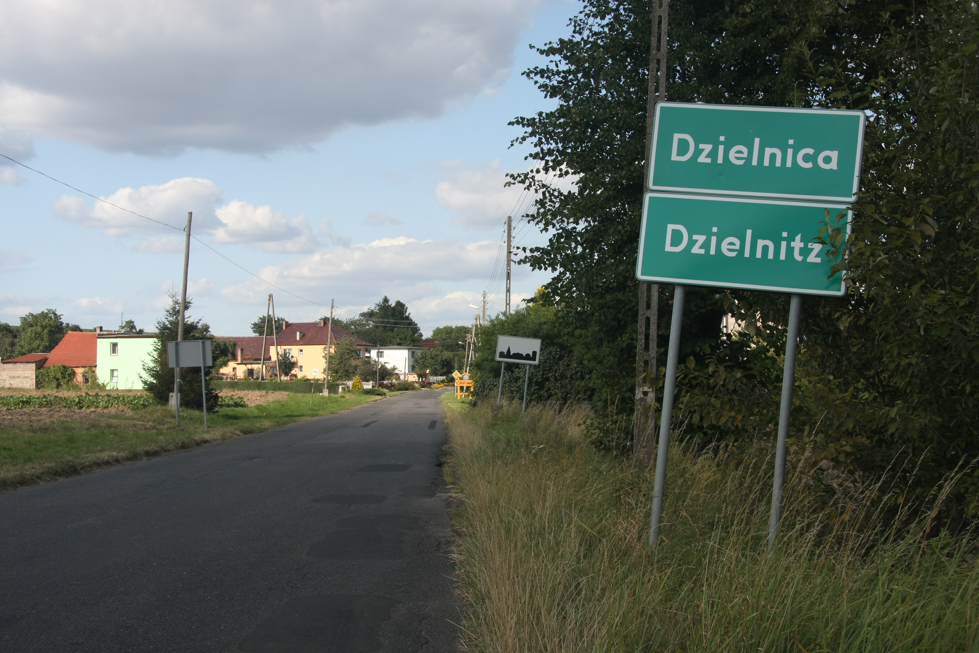 Dwujęzyczna tablica z nazwą przed wjazdem do Dzielnicy